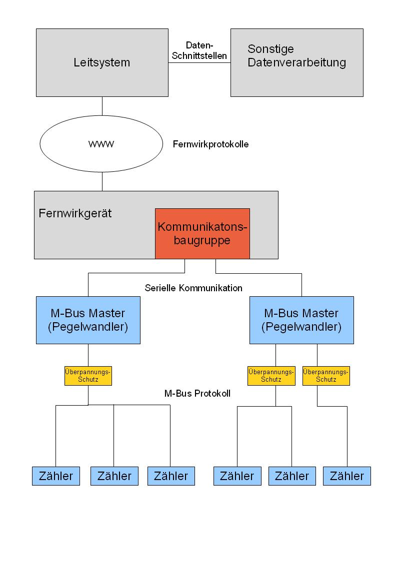 Schema für die Integration einer Zählerfernauslesung in Fernwirksysteme